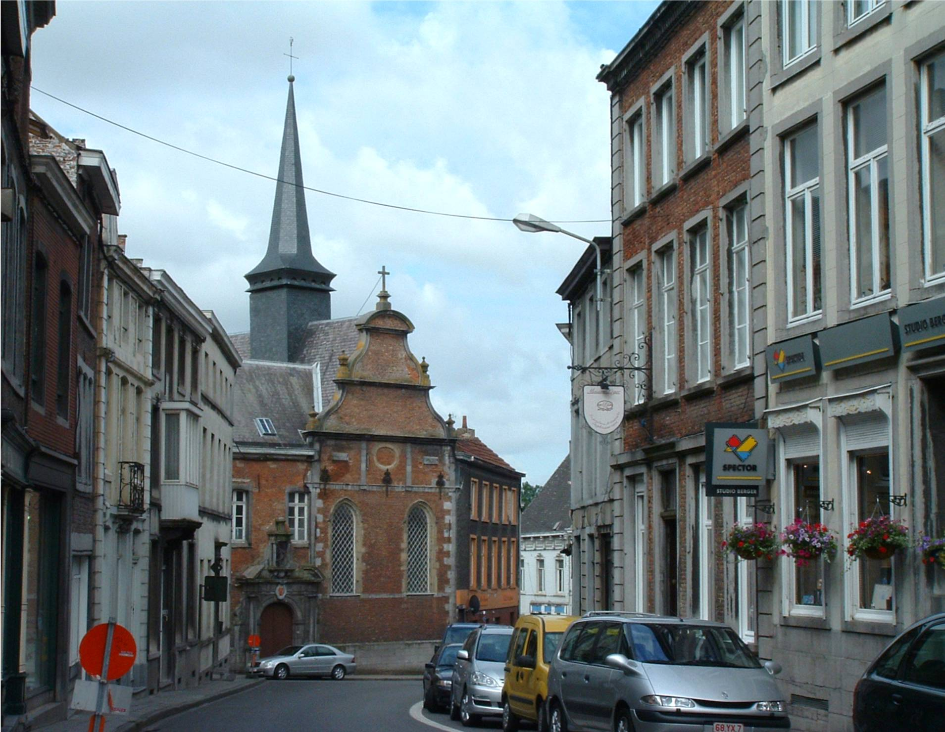 Stadsbeeld Edingen